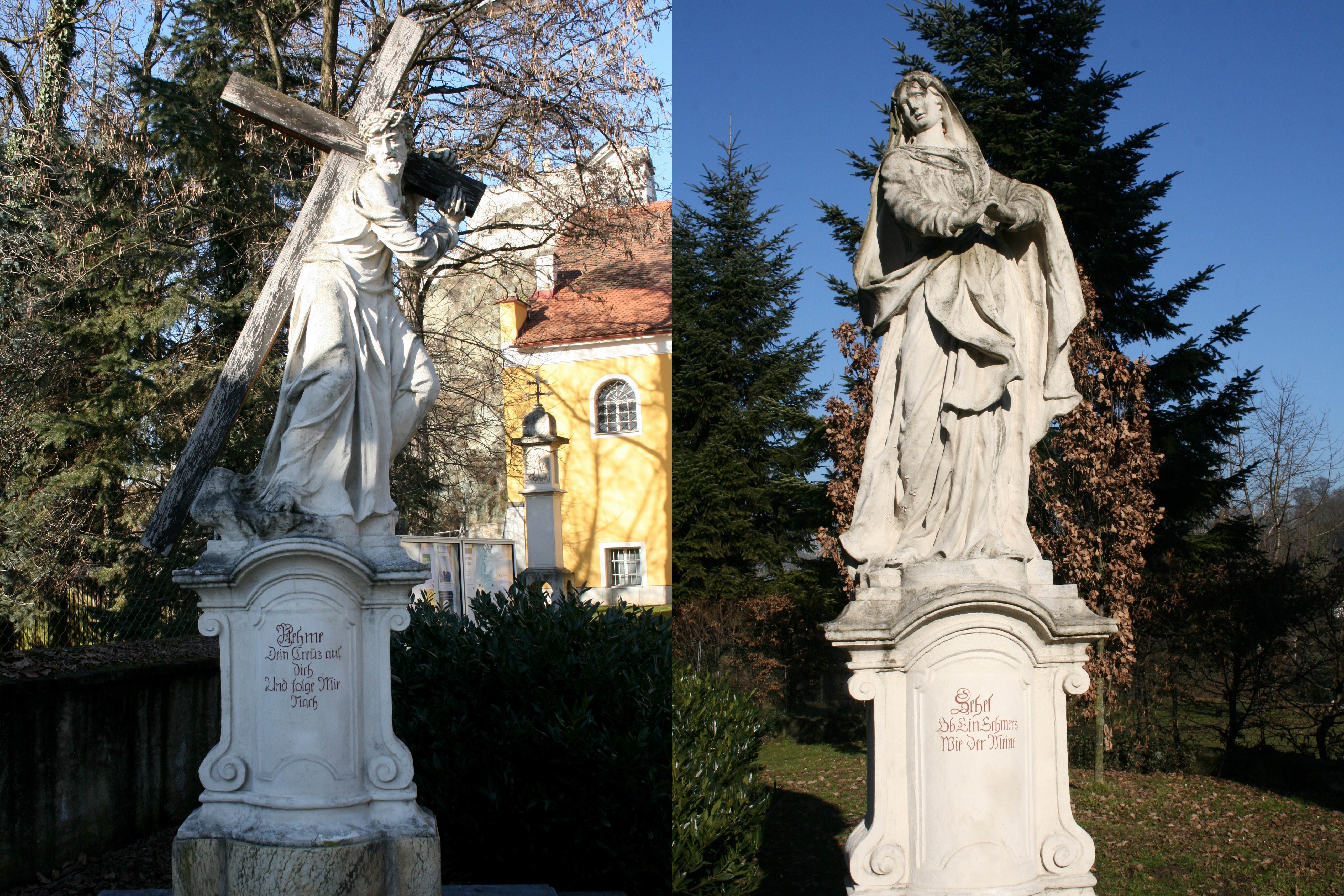 Figurenbildstöcke Kreuztragender Christus und Mater Dolorosa